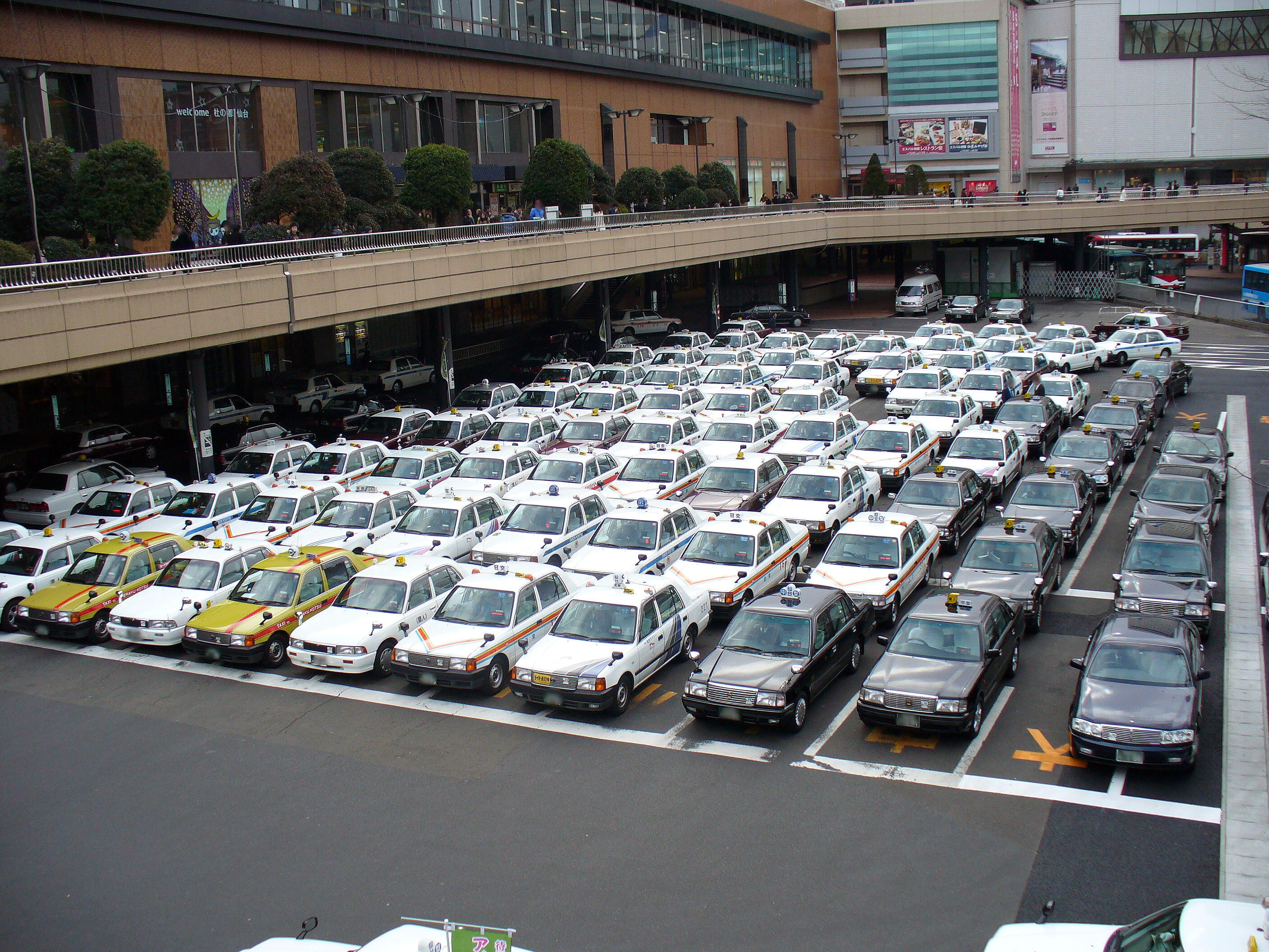 仙台駅西口タクシー乗り場